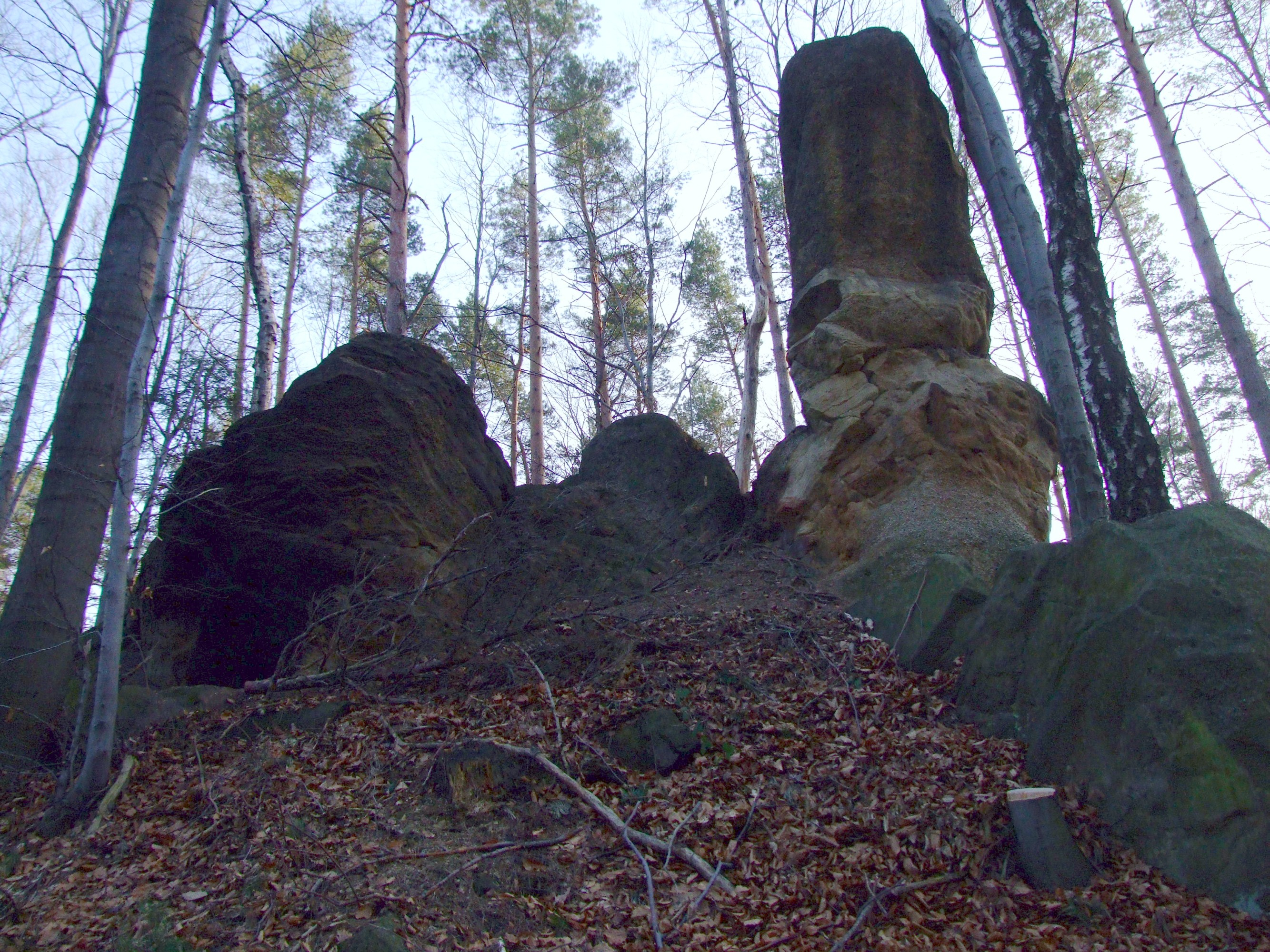 Kamień Żółw w Tarnawie